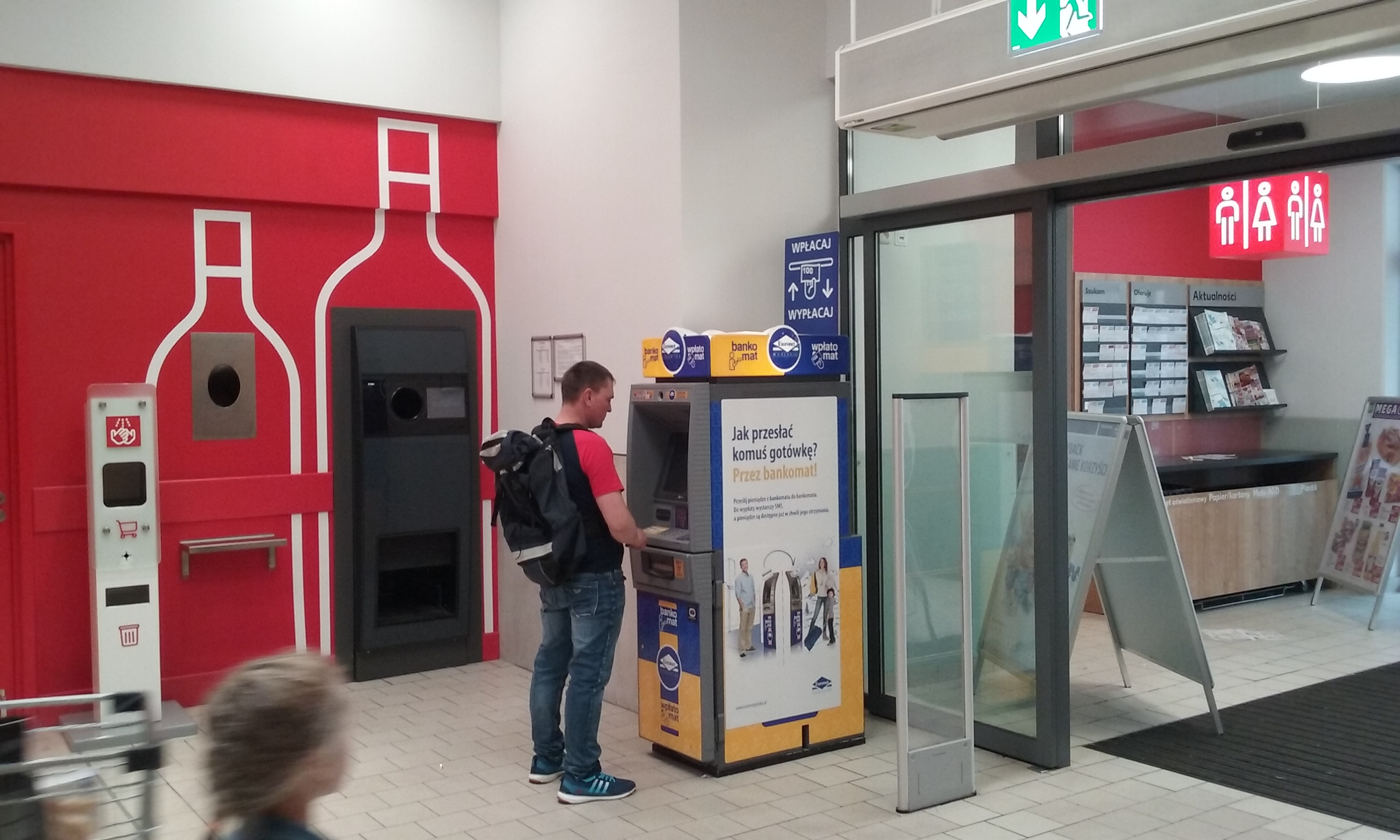 Bankomat i wpłatomat Euronetu w pasażu handlowym w Kauflandzie w sześćdziesięcio tysięcznym Tomaszowie Mazowieckim w województwie łódzkim